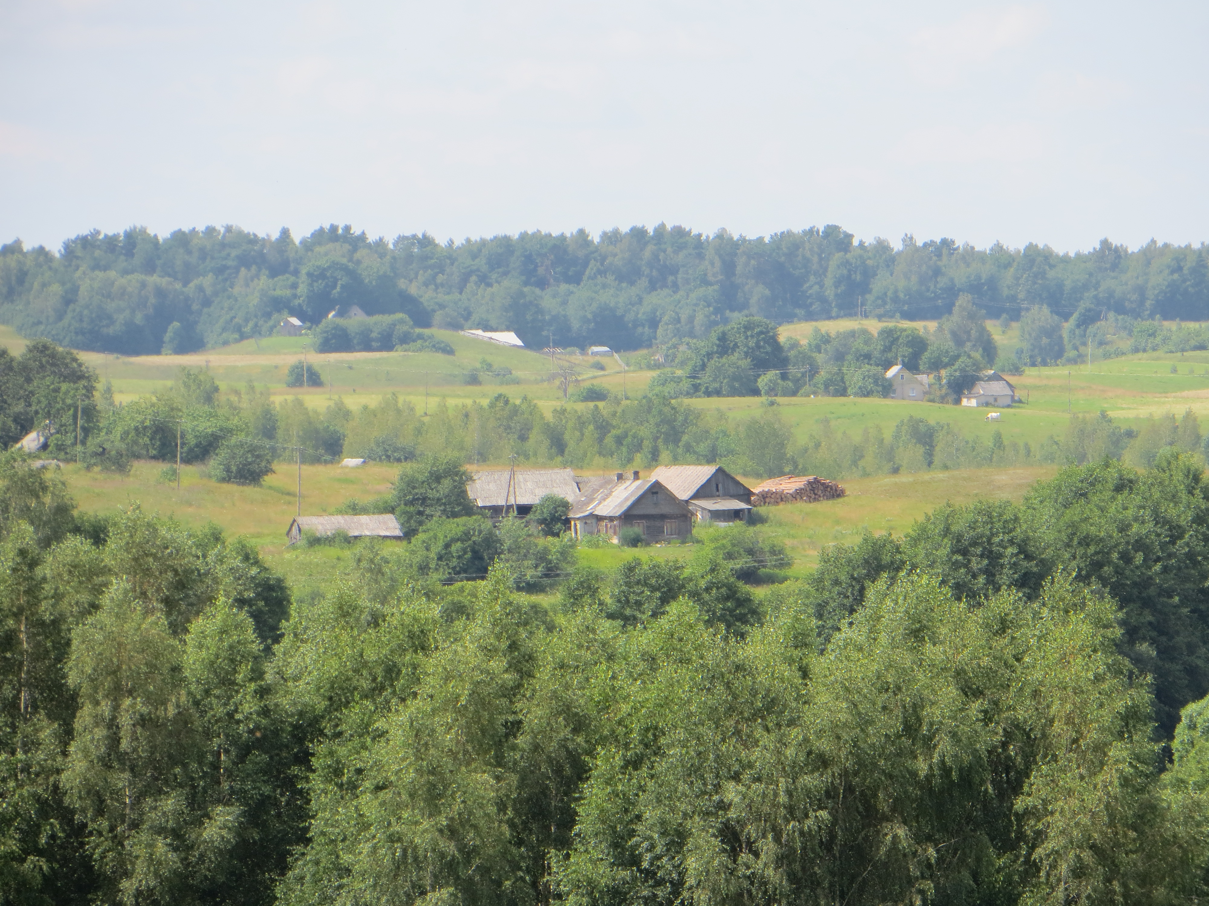 Mindūnai, Lithuania